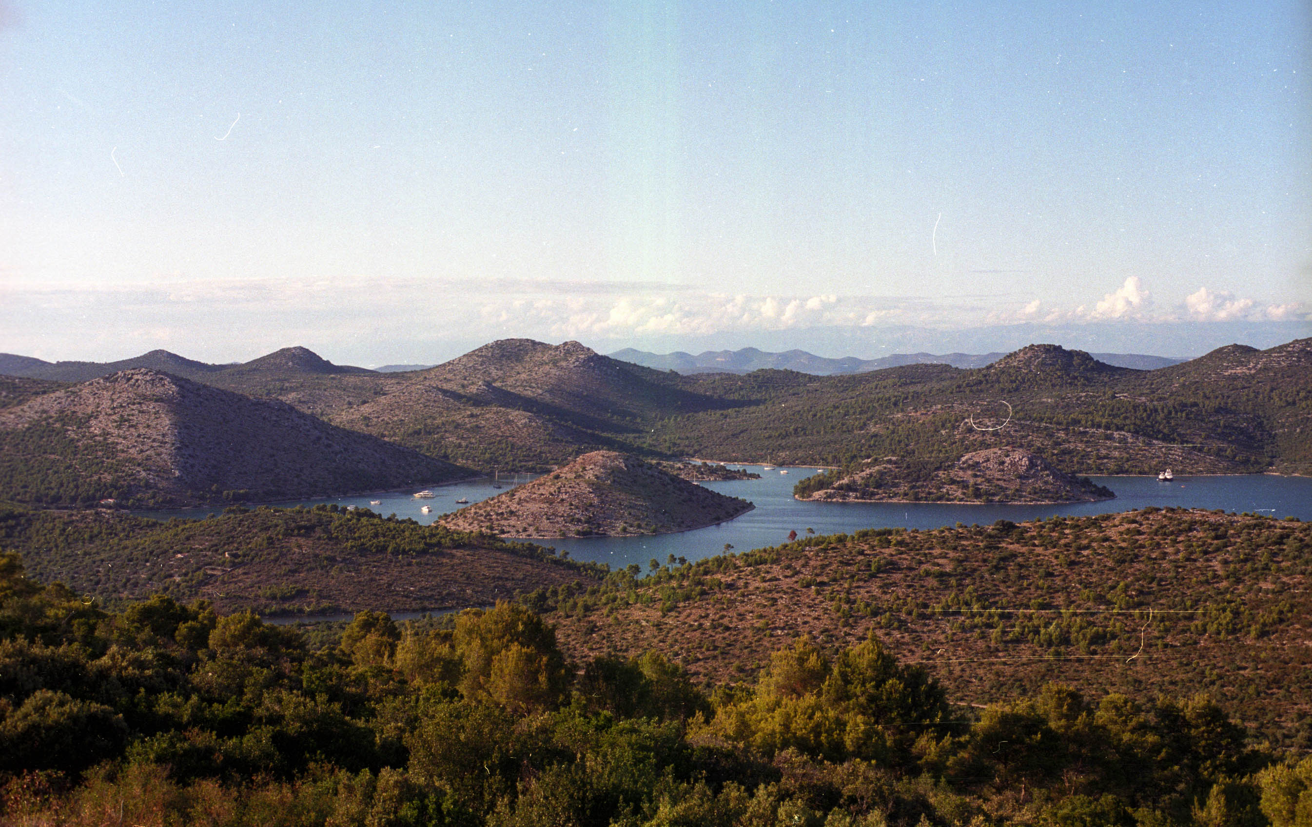 Park prirode Telašćica